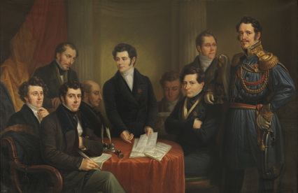 Le gouvernement provisoire de la Belgique en 1830; tableau par Charles Picqué, collection des Musées des Beaux-Arts de Belgique